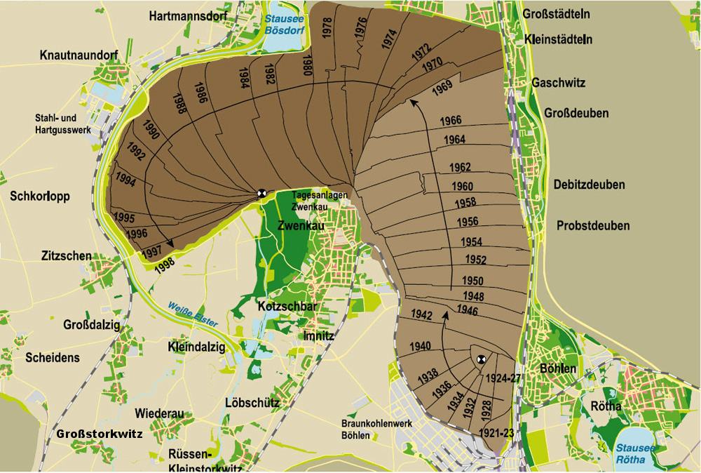 Darstellung der zeitlichen Entwicklung des Tagebaus Zwenkau